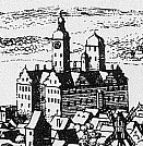 Wolgast palace. Detail from: Fotothek df rp-b 0380023 Wolgast. Stadtansicht mit Bockwindmühle, 1652, Ausschnitt.jpg Original image description from the Deutsche FotothekWolgast. Stadtansicht mit Bockwindmühle, 1652, Ausschnitt